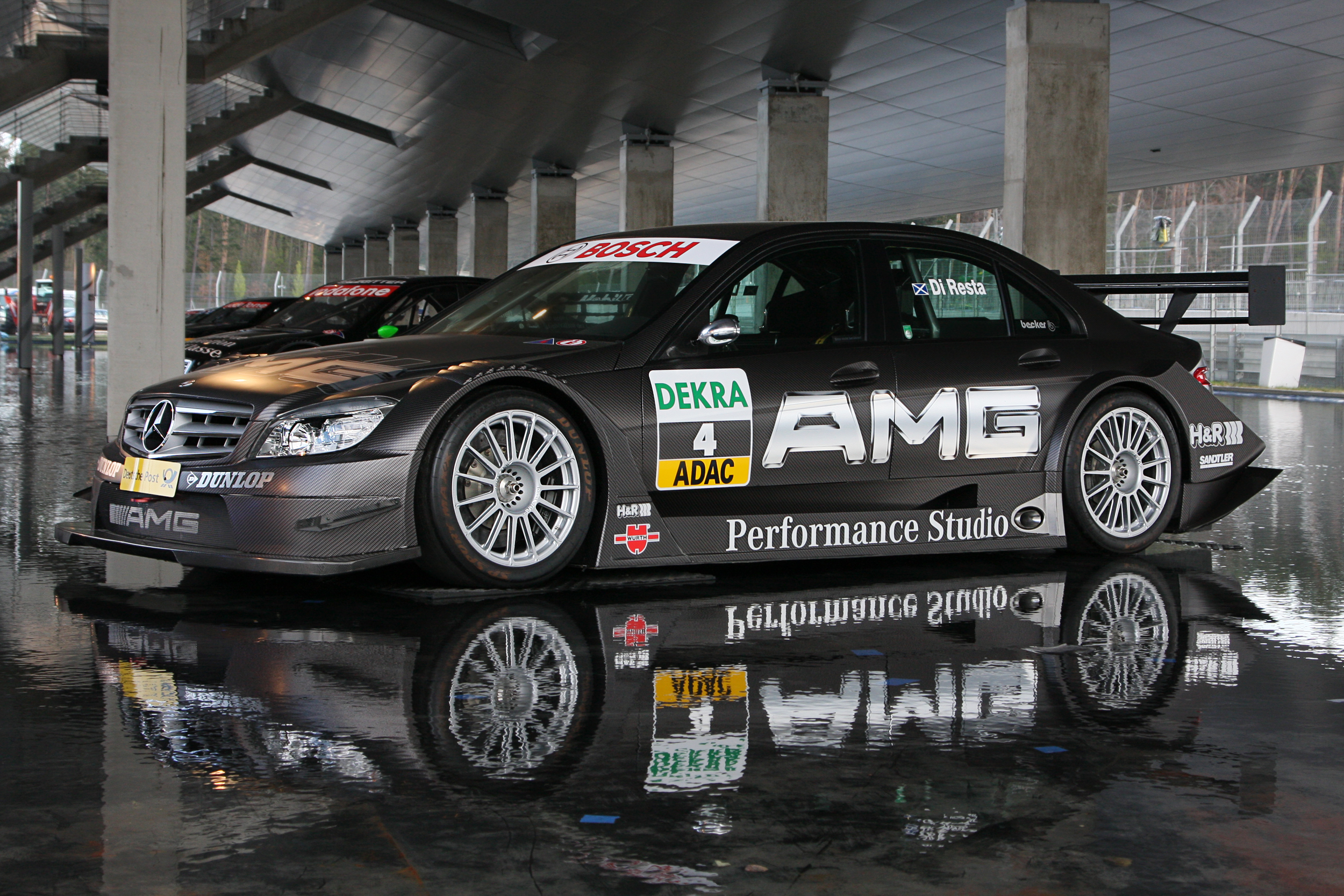 DTM car Mercedes-Benz Season 2008 (C-Class, W204), Paul di Resta (driver)